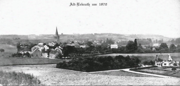 Ansicht von Alt-Erkrath aus dem Jahre 1870. Blick in Richtung Südwesten auf die heutige Kirchstraße und Beethovenstraße, sowie auf dem Kirchturm der kath. Kirche